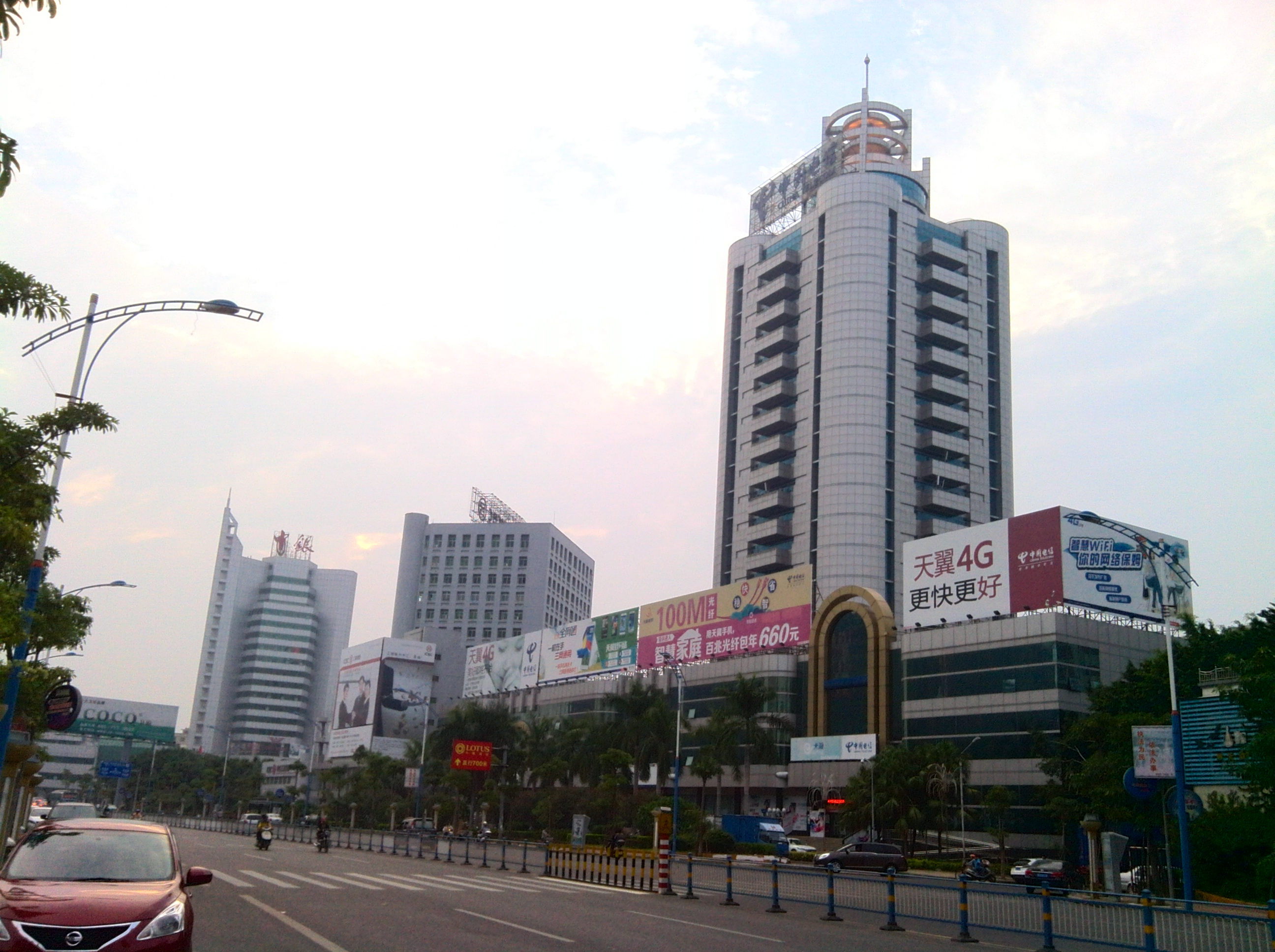 位于中国广东省潮州市潮枫路和潮州大道的三幢大厦，分别是中银大厦（左）、工商银行大厦（中）、电信大厦（右）。